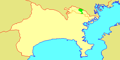 Map of Takatsu-ku, Kawasaki, Kanagawa-prefecture, Japan